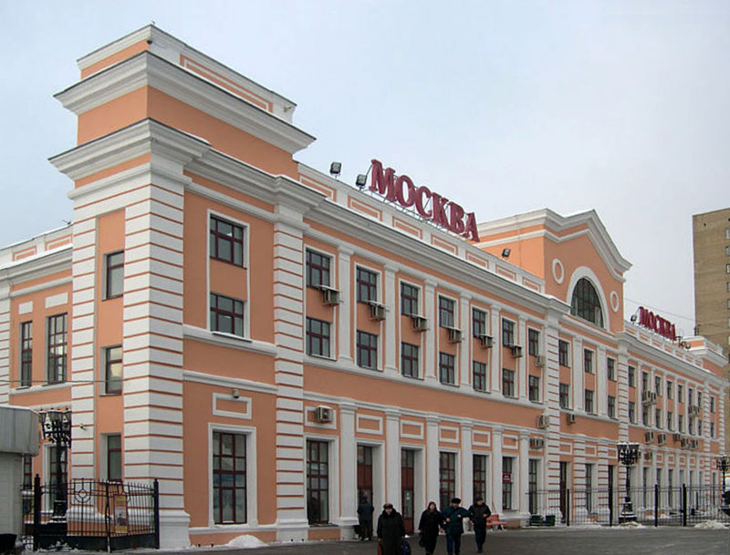 Савеловский вокзал города Москвы вид со стороны поездов, зима 2006